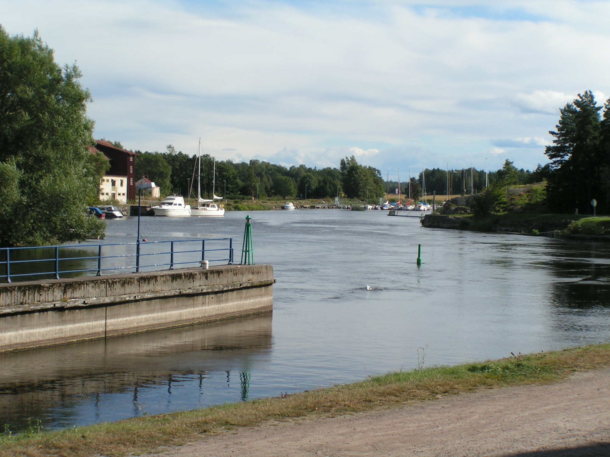 Byälven in Säffle